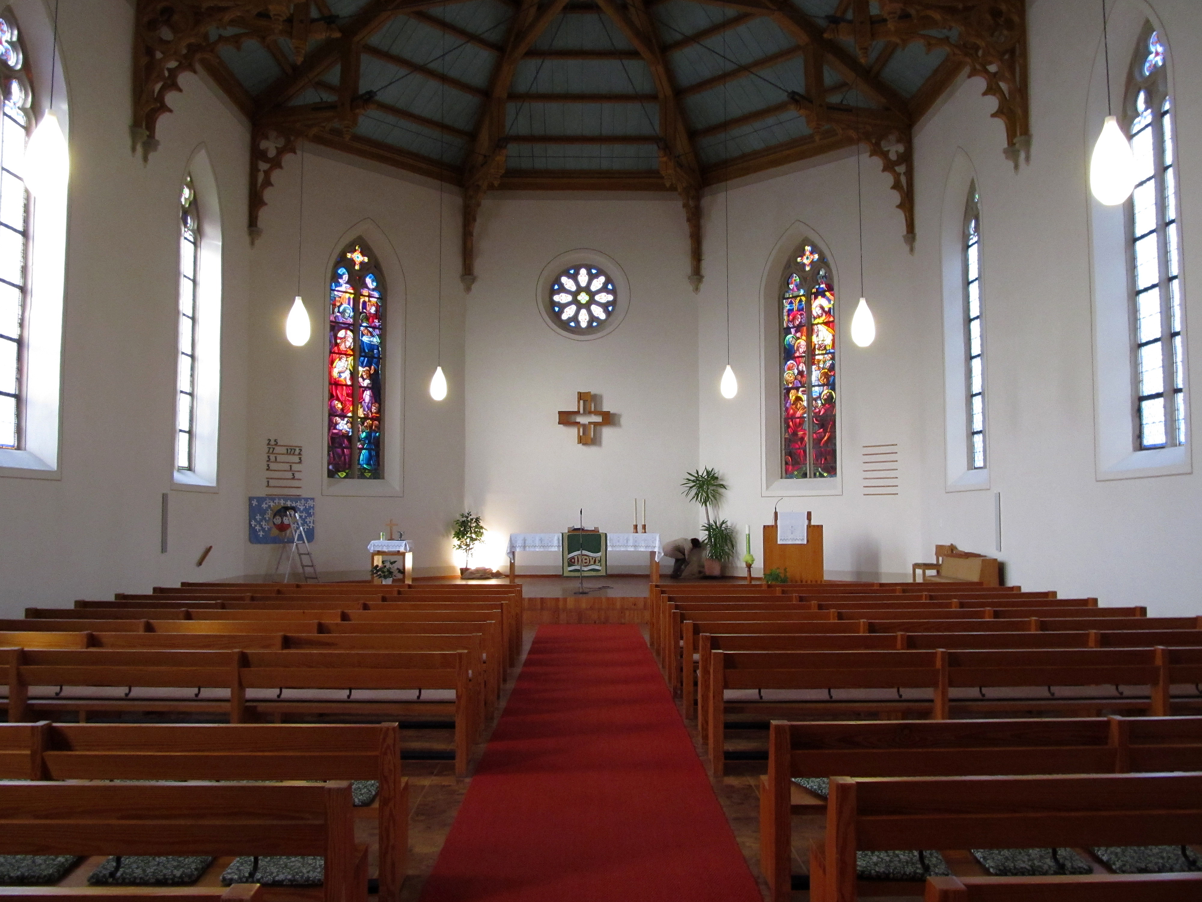 Blick ins Innere der protestantischen Friedenskirche in Kirkel, Saarland